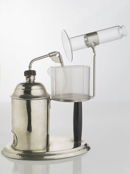 Inhalator der Seidel GmbH & Co. KG